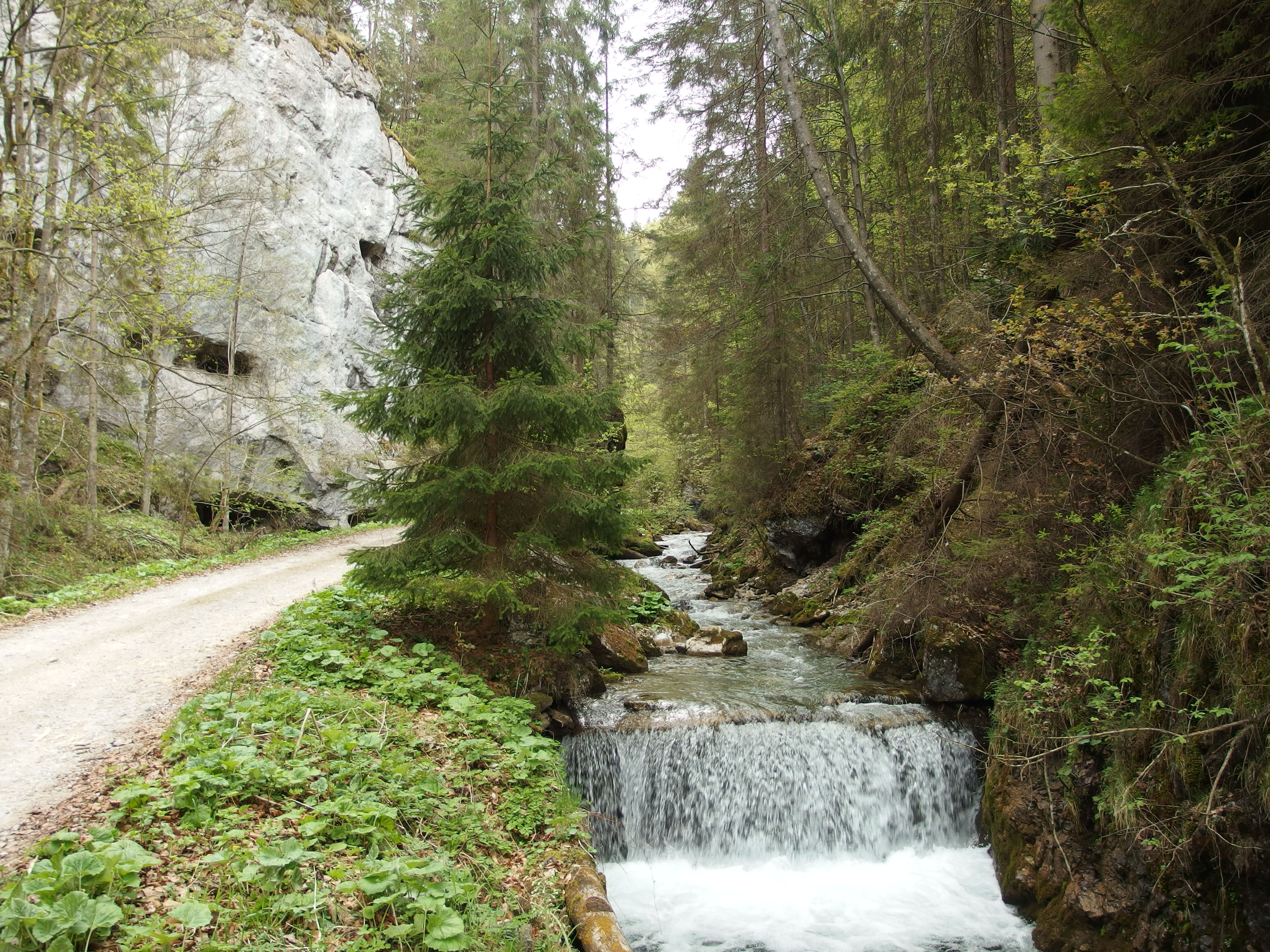 kaskády Gaderského potoka